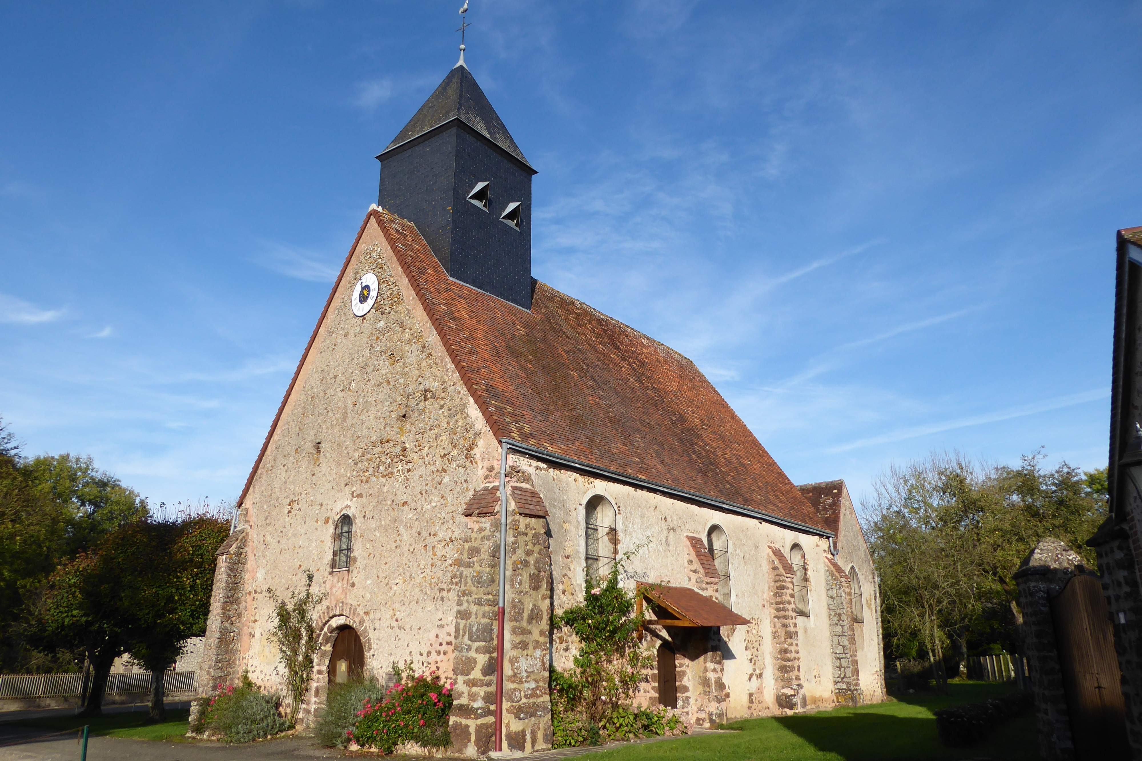 église Saint-Antoine, Mottereau, Eure-et-Loir, France.